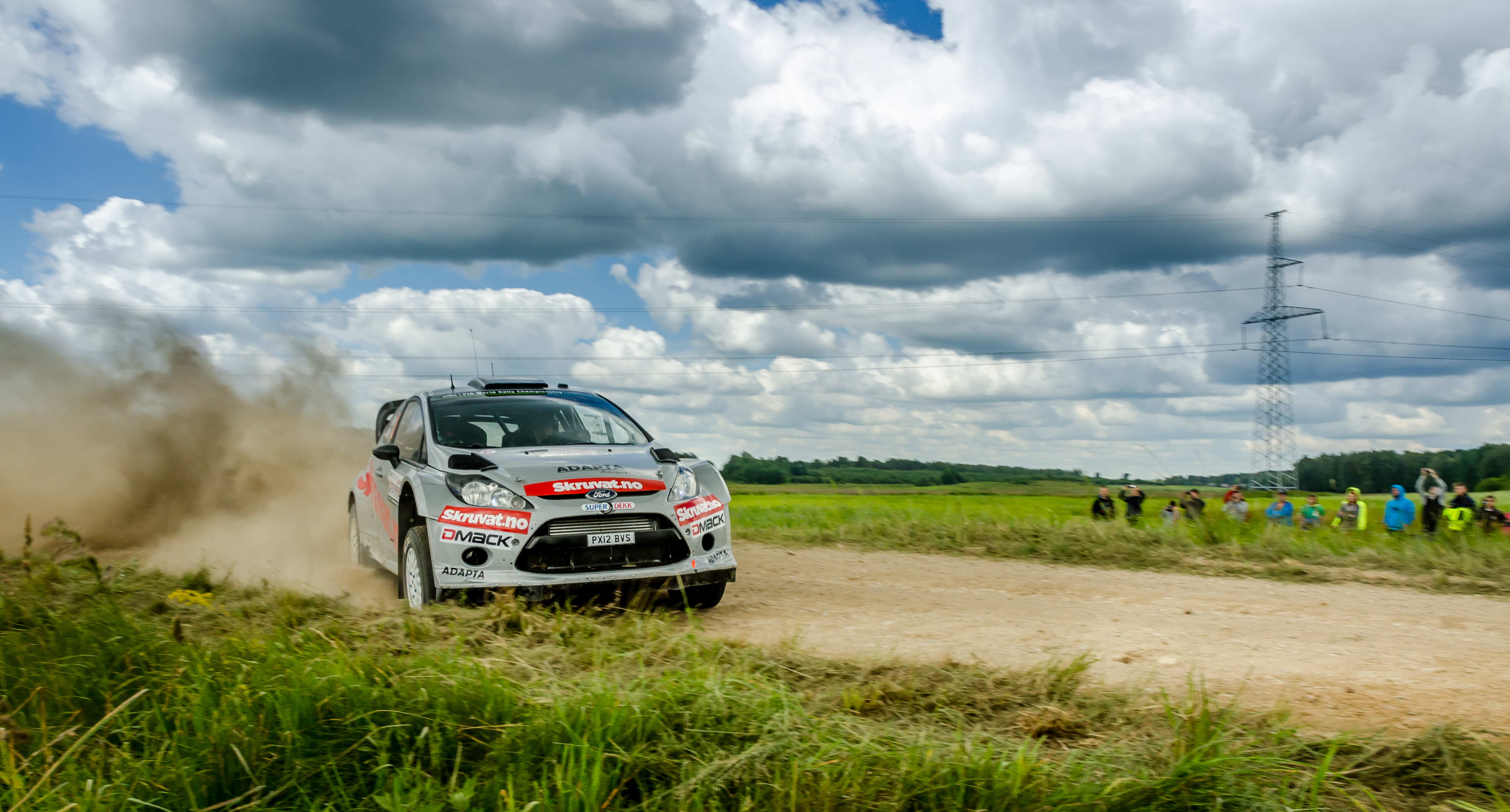 Henning Solberg podczas Rajdu Polski 2014 jadący Fordem Fiestą WRC